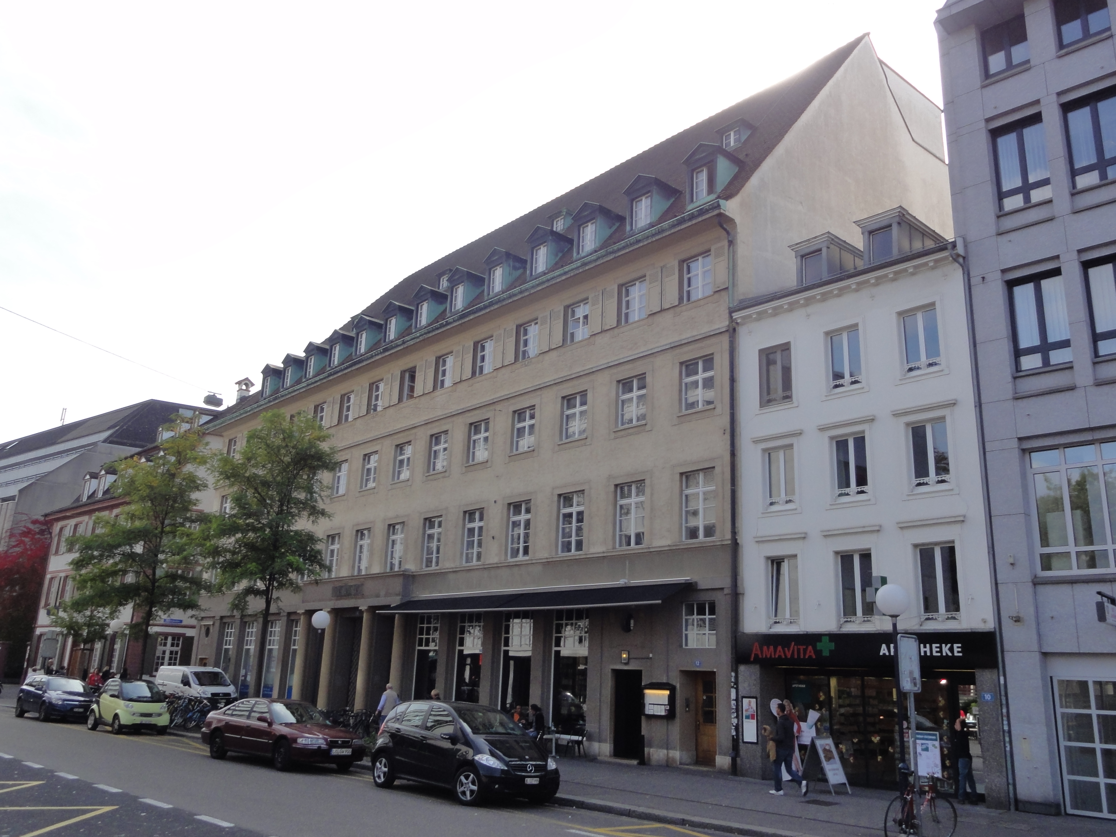 Basel – Rebgasse 12-14 („Volkshaus“) – Aussenansicht von der Rebgasse